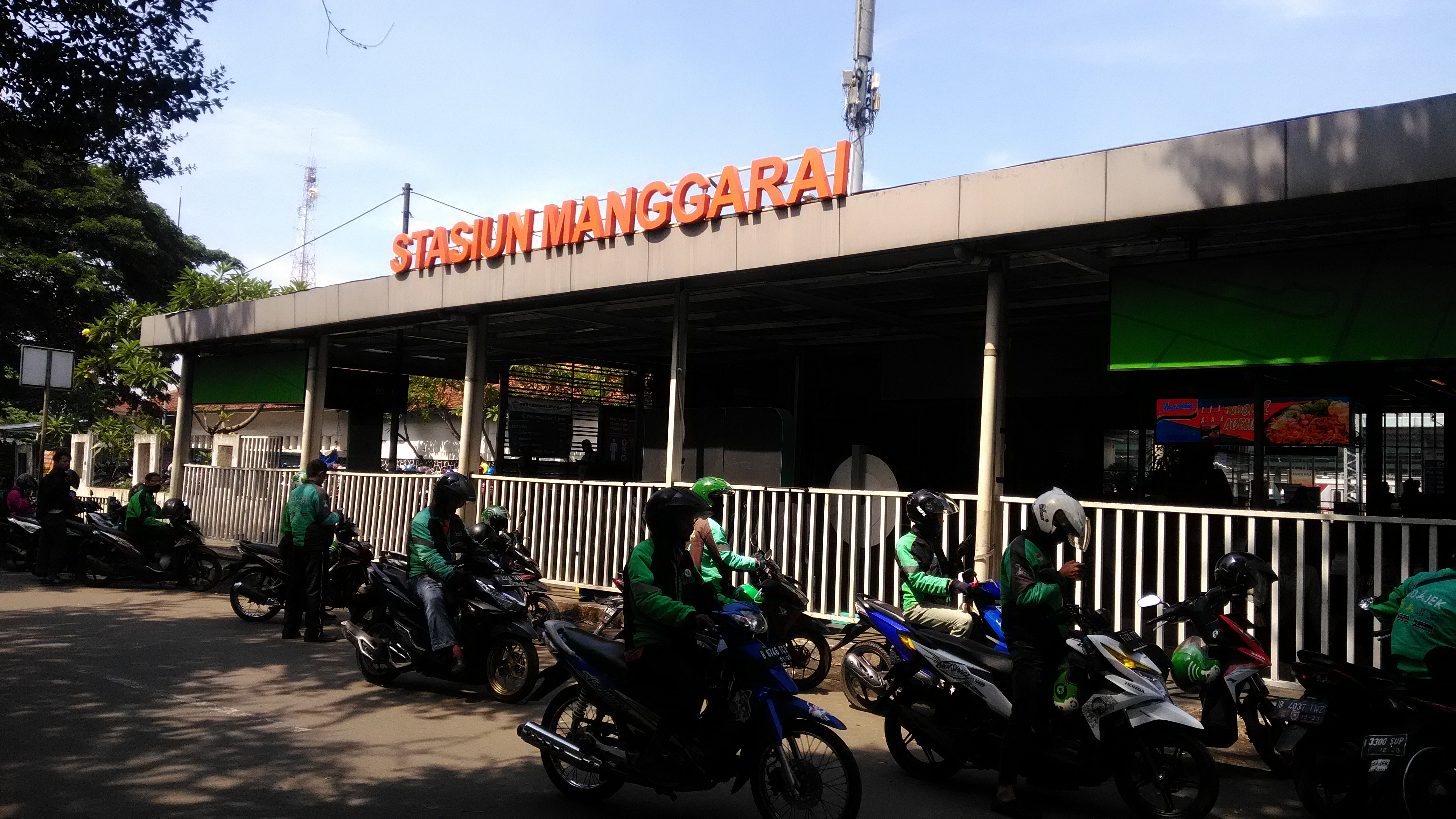 Pintu masuk Stasiun Manggarai, 2019 Sunda: Pintu asup Stasion Manggarai, 2019